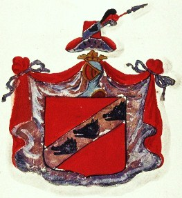 Wappen des schwedischen Majors Christoffer von Güntersberg (+ 1678) aus dem neumark-pommerschen Adelsgeschlecht